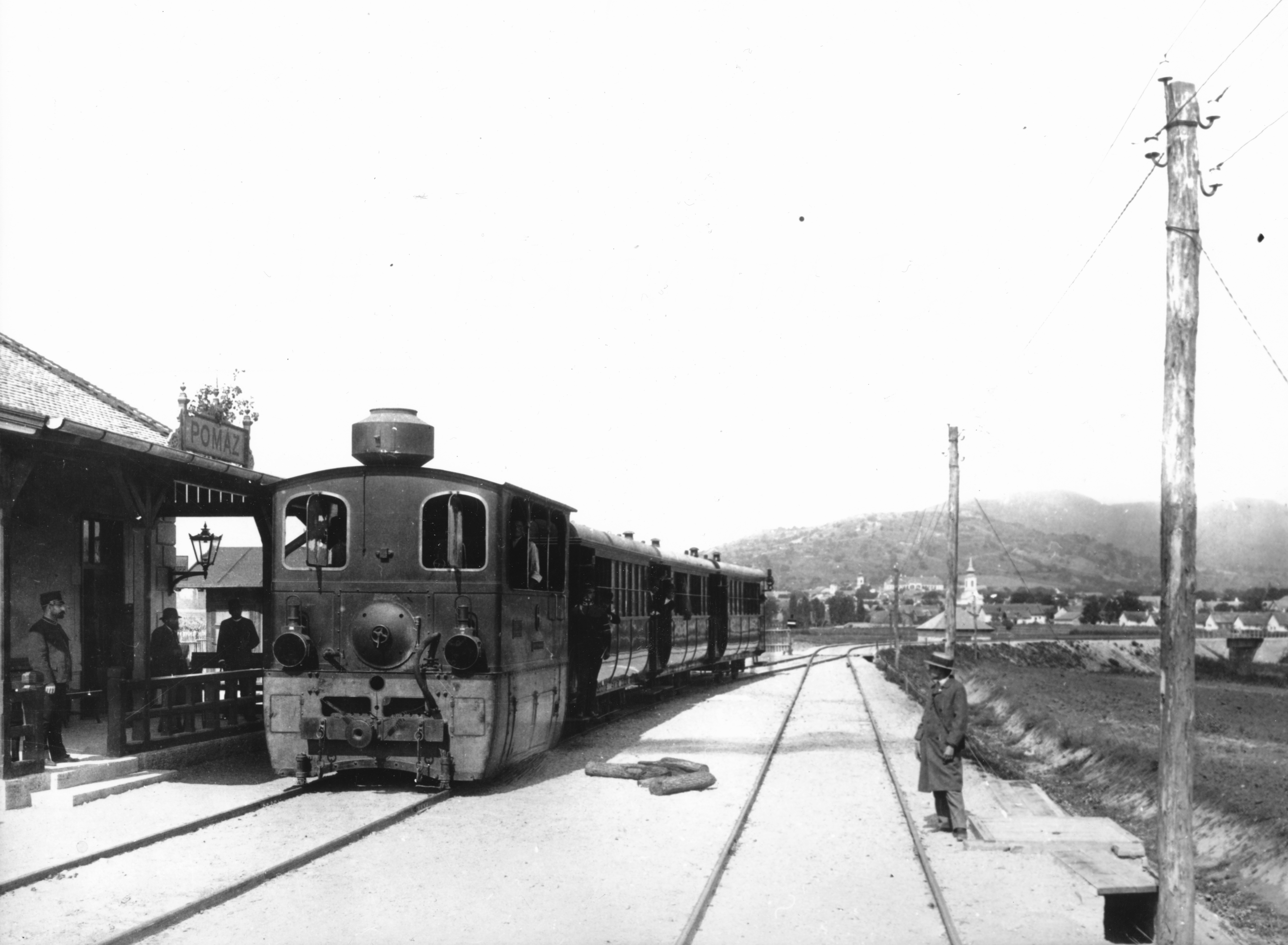 gőzmozdony vontatta HÉV szerelvény az állomáson, a szentendrei vonal megnyitásának idején. Location: Hungary Tags: railway, steam locomotive, coach, train station Title: gőzmozdony vontatta HÉV szerelvény az állomáson, a szentendrei vonal megnyitásának idején.